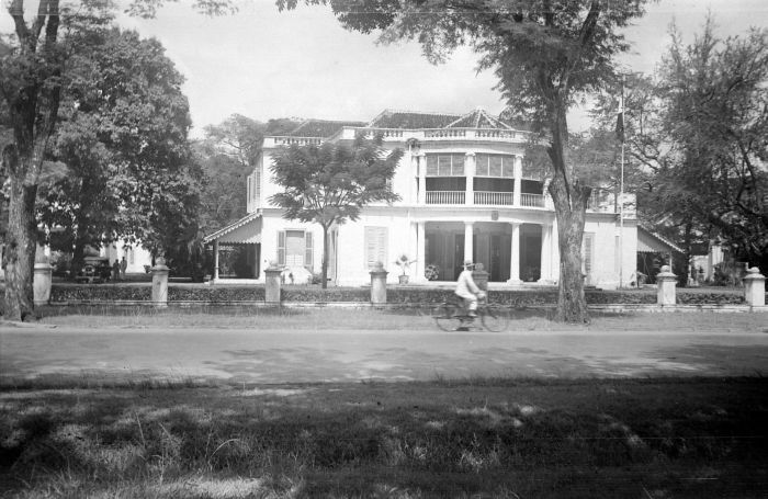 Negatief. Frans Consulaat, Koningsplein, Batavia 1940